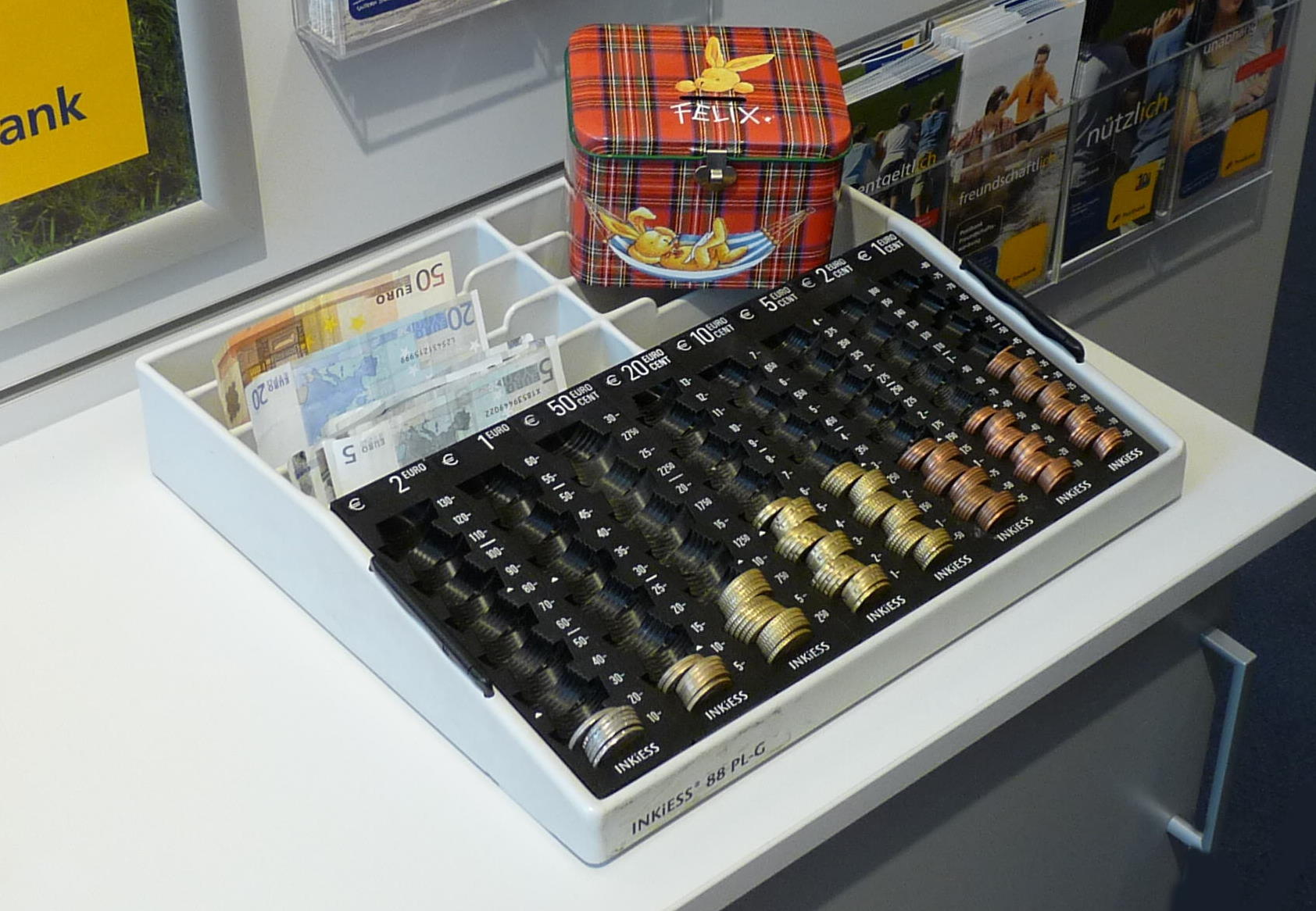 Brett, offener Kasten zum Zählen von Münzen (mit geräumter Spardose)